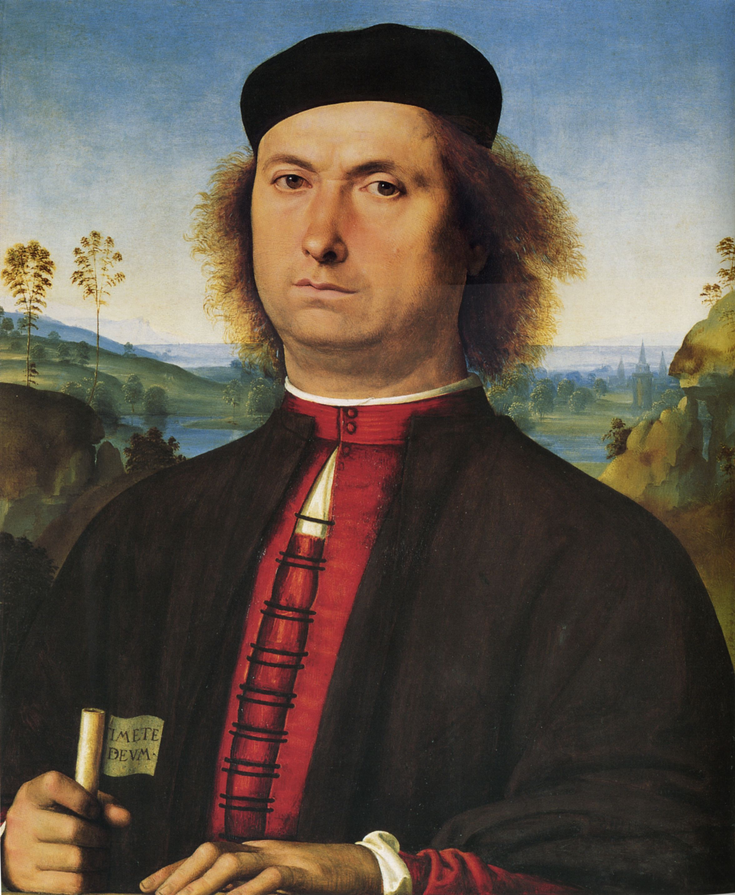 Cat. no. 37 in Vittoria Garibaldi: Perugino. Catalogo completo. Octavo, Firenze 2000, ISBN 88-8030-091-1